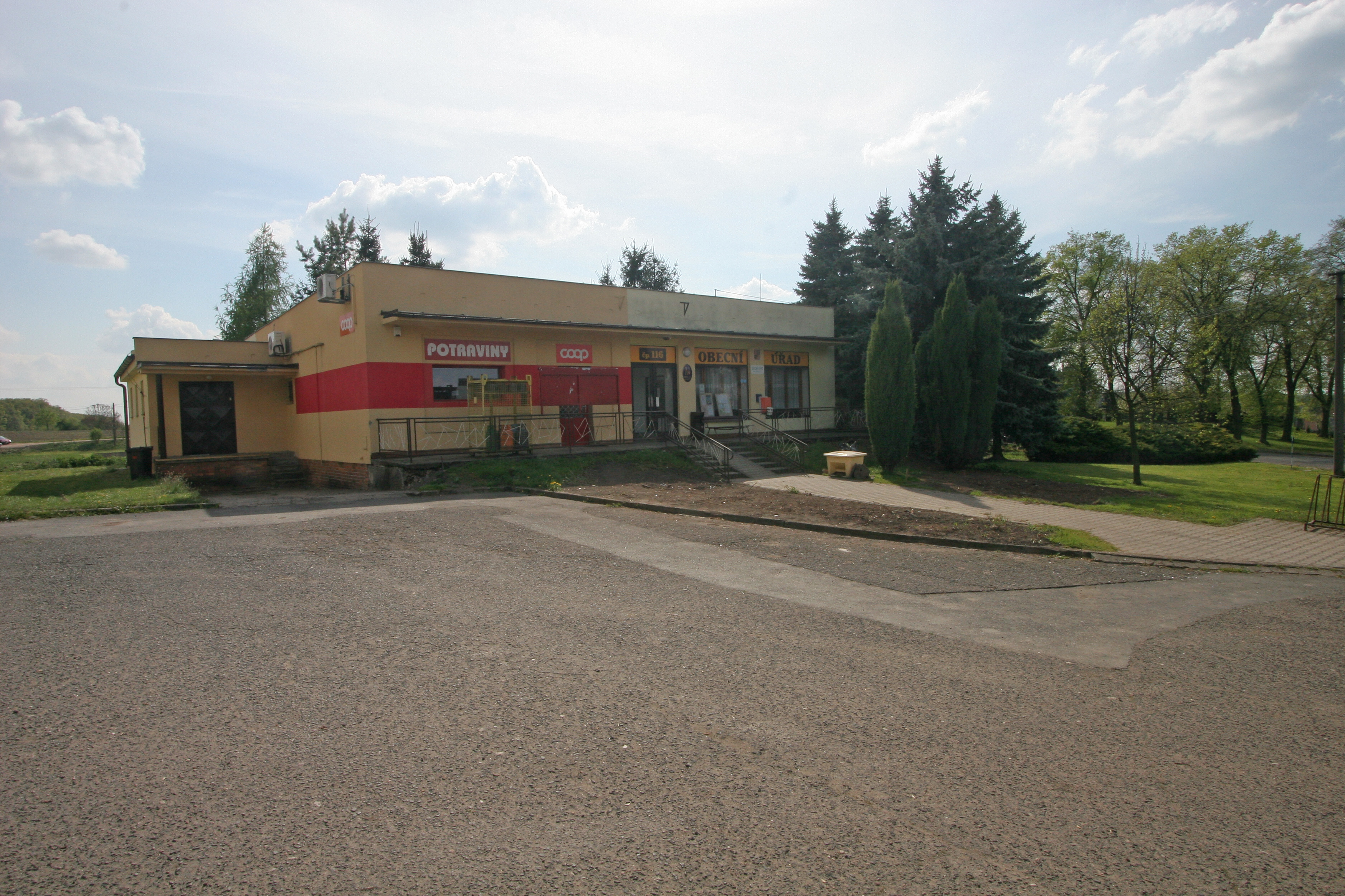 Slavhostice obecní úřad a prodejna